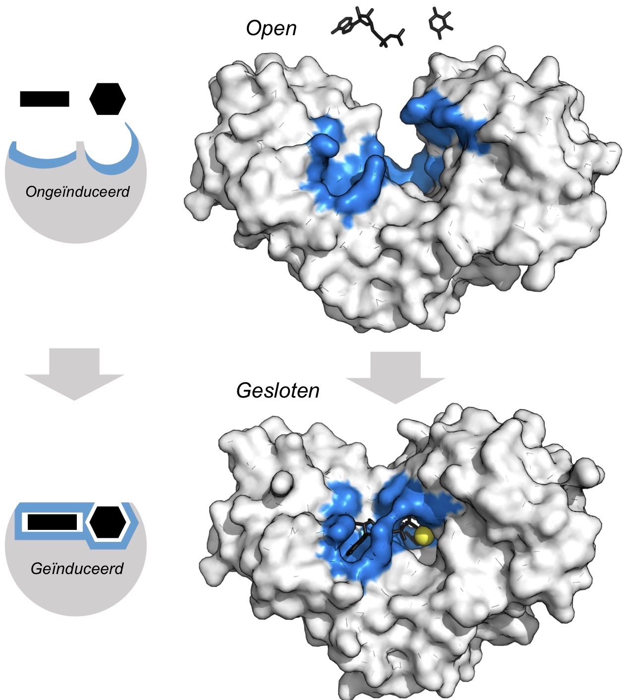 Voorbeeld van geïnduceerde pasvorm. Hexokinase verandert dermate van vorm dat de substraten adenosinetrifosfaat en xylose volledig worden omsloten. Bindingsplaats in blauw, substraten in zwart en magnesium co-factor in geel.